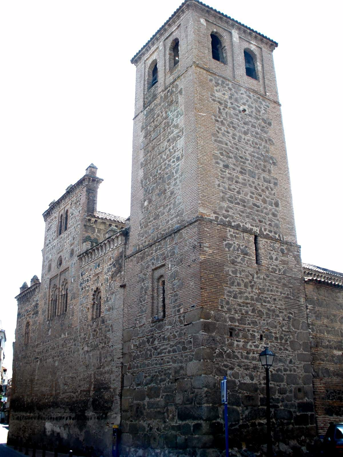 Talavera de la Reina - Iglesia de Santiago el Nuevo